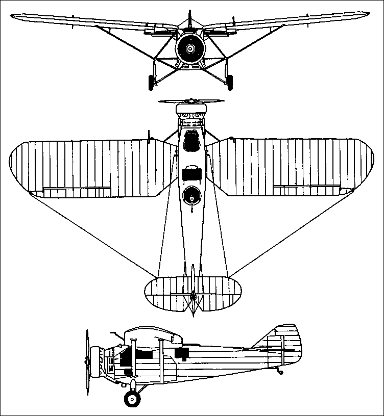 Чертёж